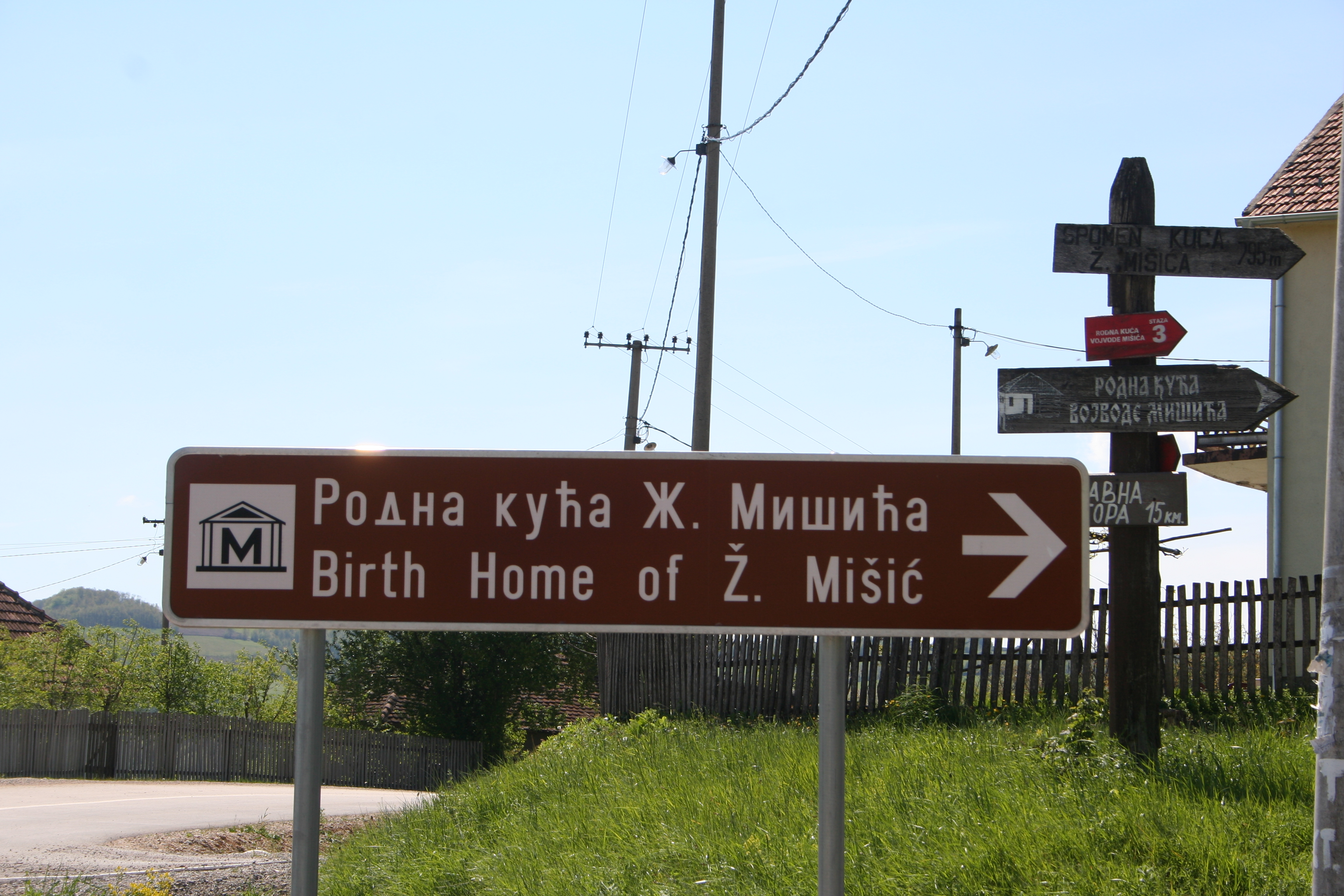 Putokaz, Struganik